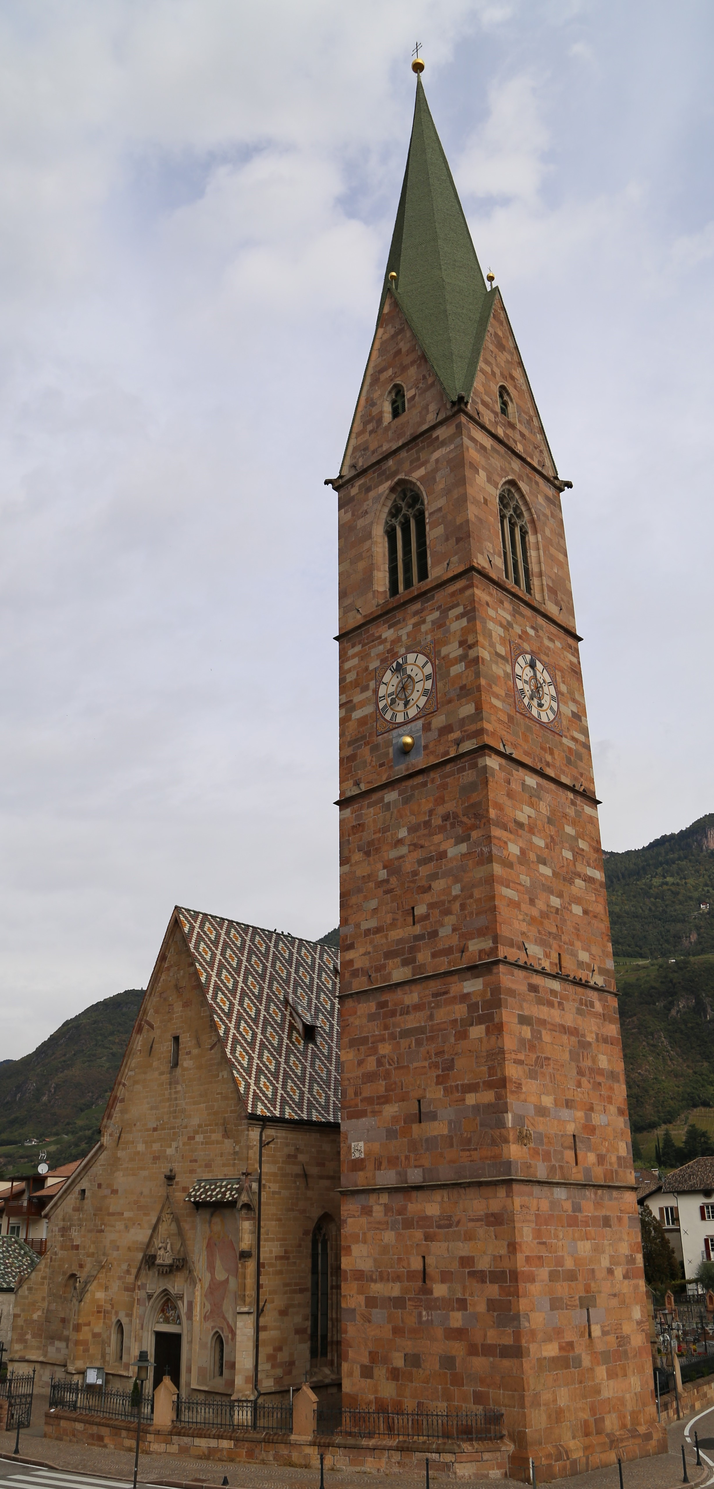 Pfarrkirche Maria Himmelfahrt in Terlan Object location46° 31′ 46.62″ N, 11° 14′ 55.38″ E